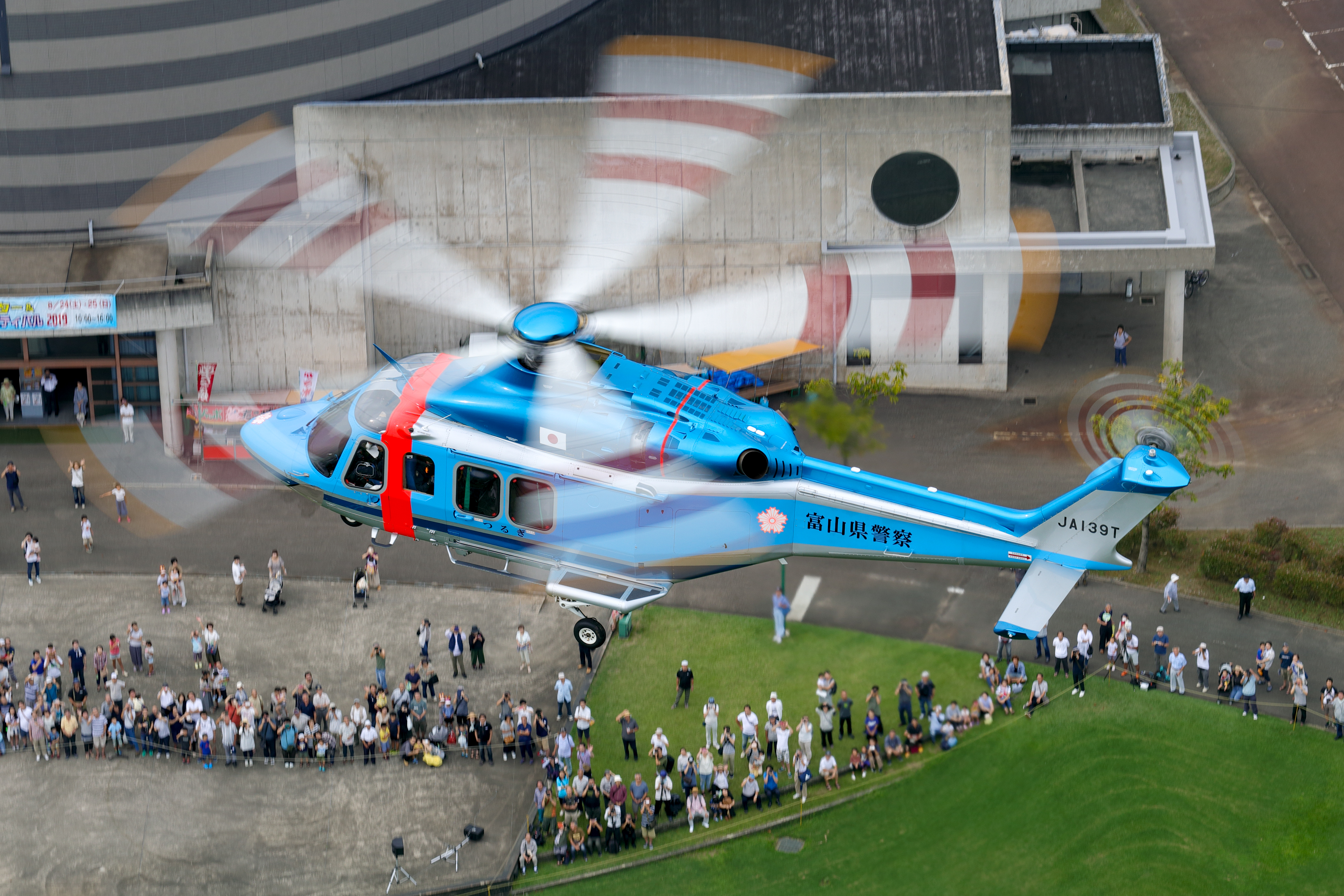 クロスランドおやべで撮影された、富山県警察航空隊のAW139 つるぎ